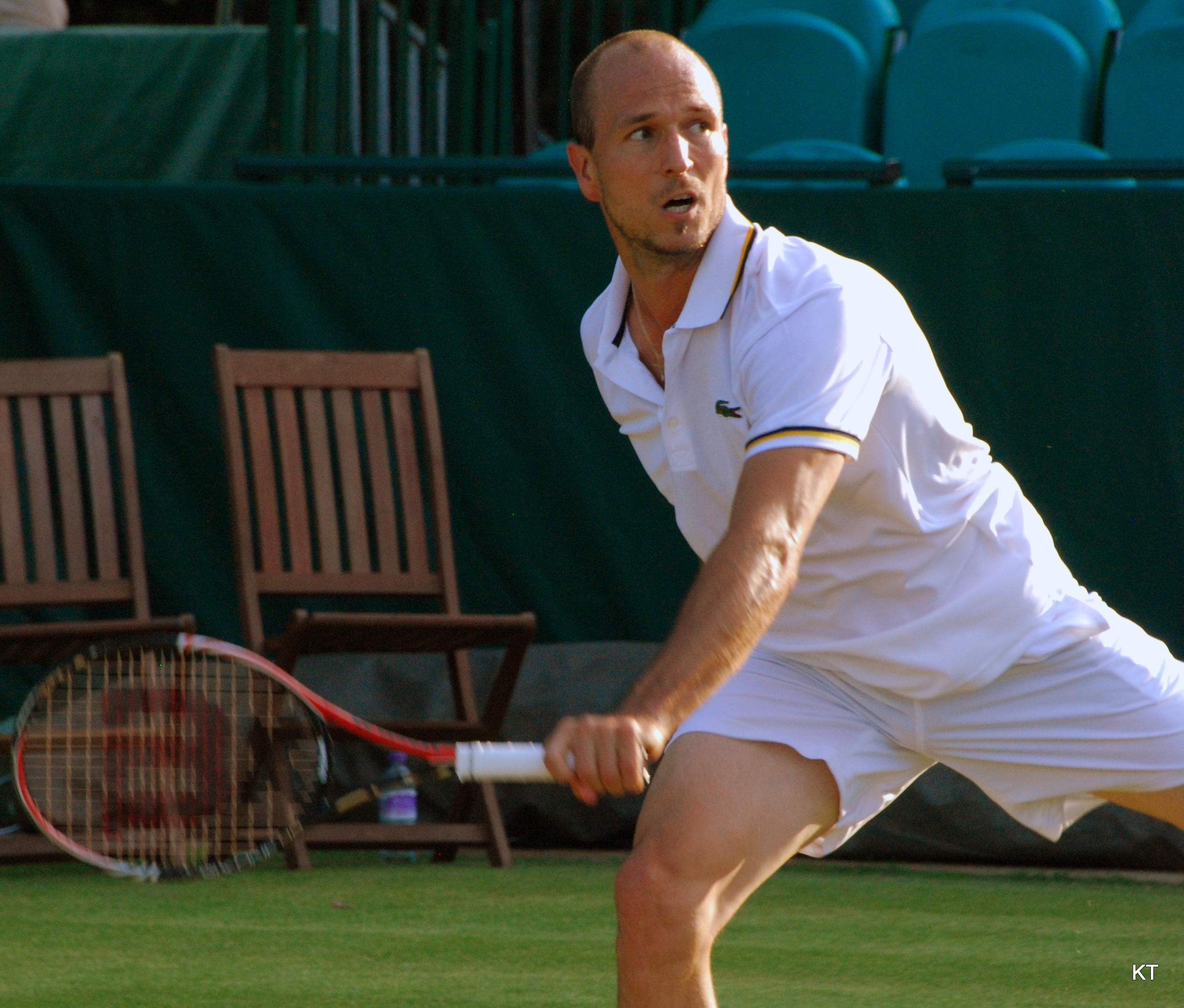 James Cerretani